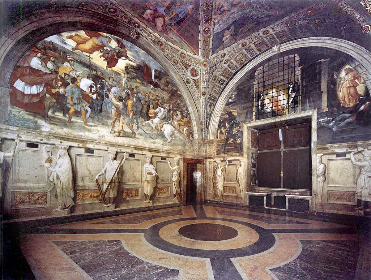 Pohľad do Stanza di Eliodoro v Apoštolskom paláci vo Vatikáne